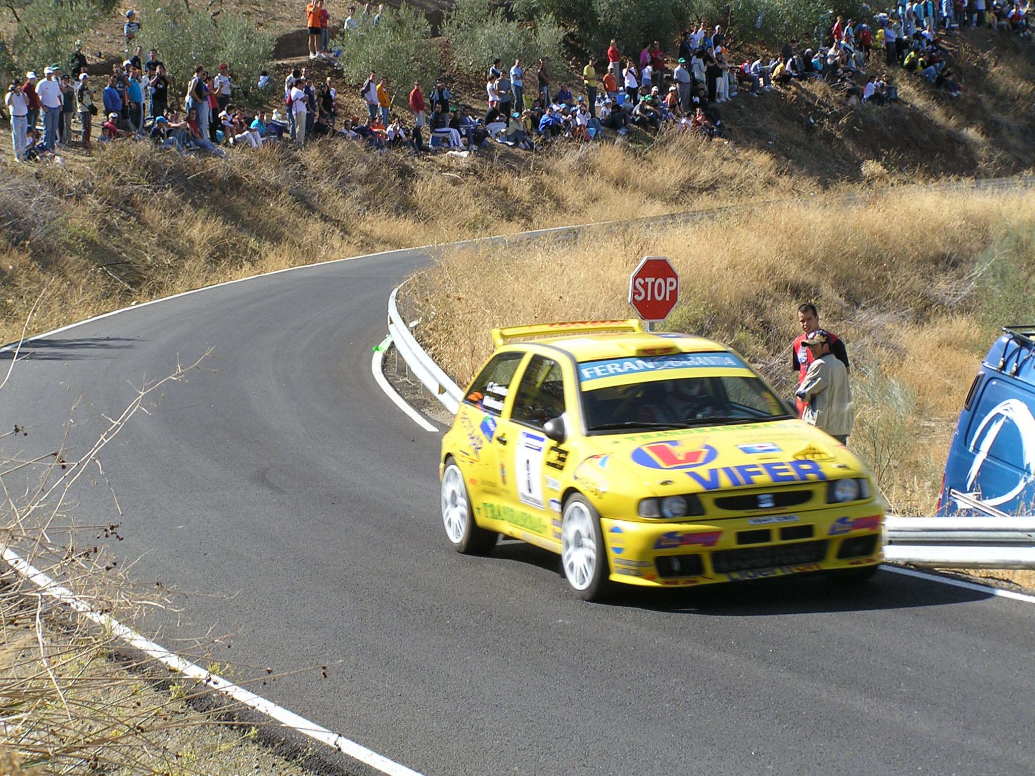 Rally Subida a la Mota, en Alcalá la Real (provincia de Jaén, Andalucía, España).